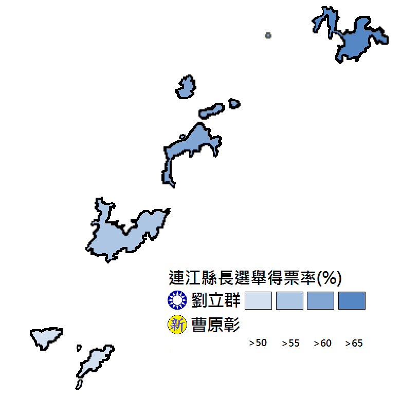 1997年連江縣長選舉